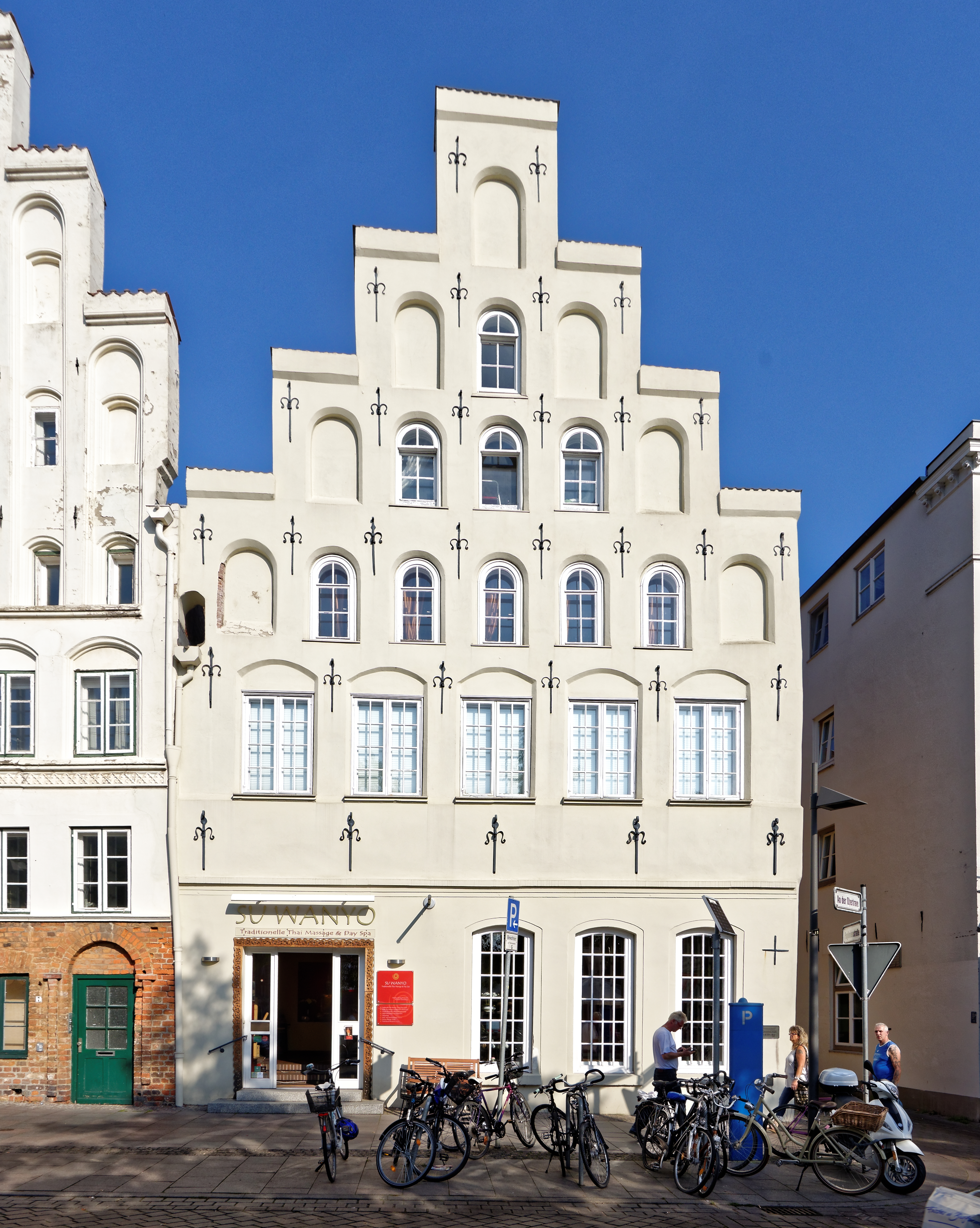 Lübecker Altstadt, An der Obertrave 8